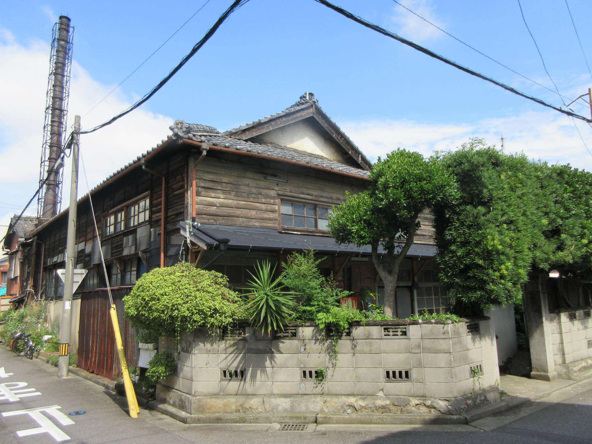 龍城温泉（岡崎市田町）